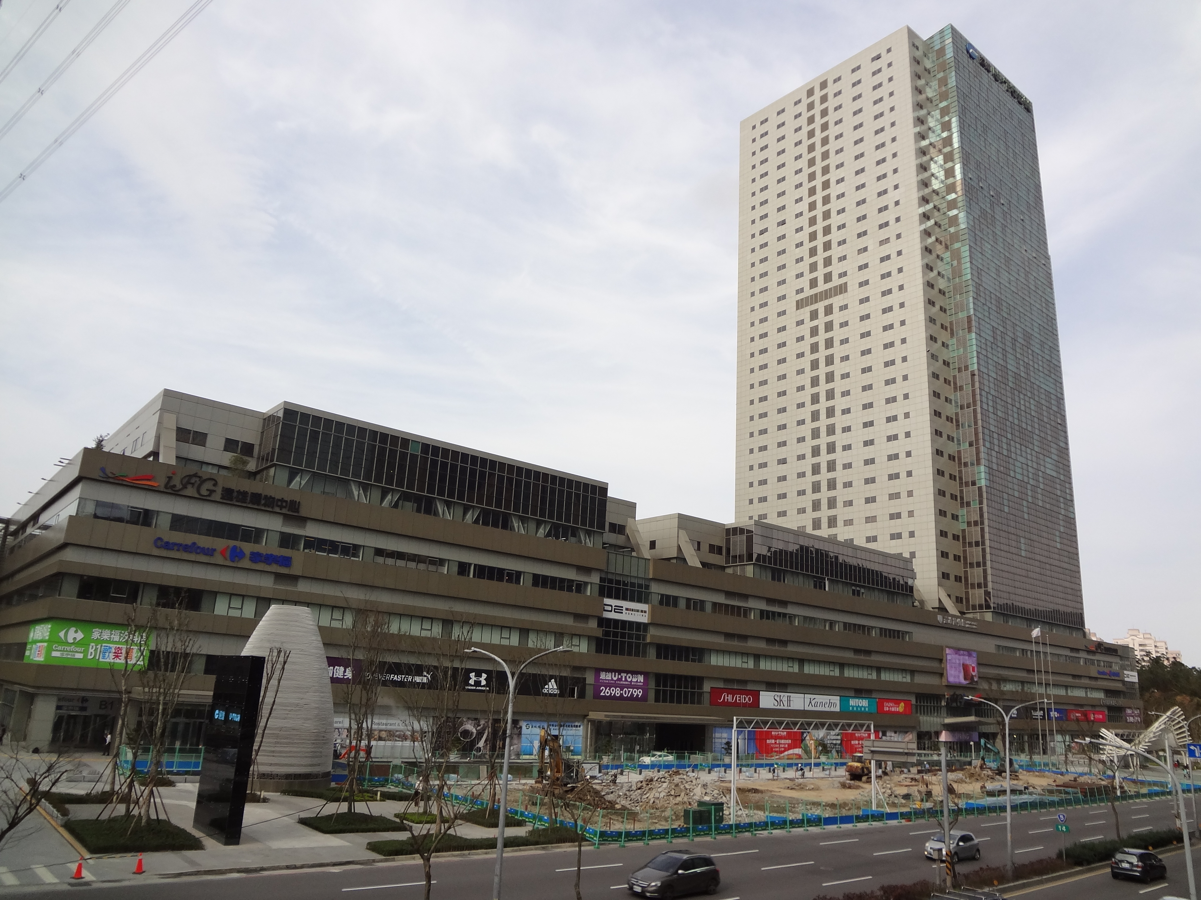 遠雄U-Town，位於臺灣新北市汐止區新台五路一段93、95、97、99號。